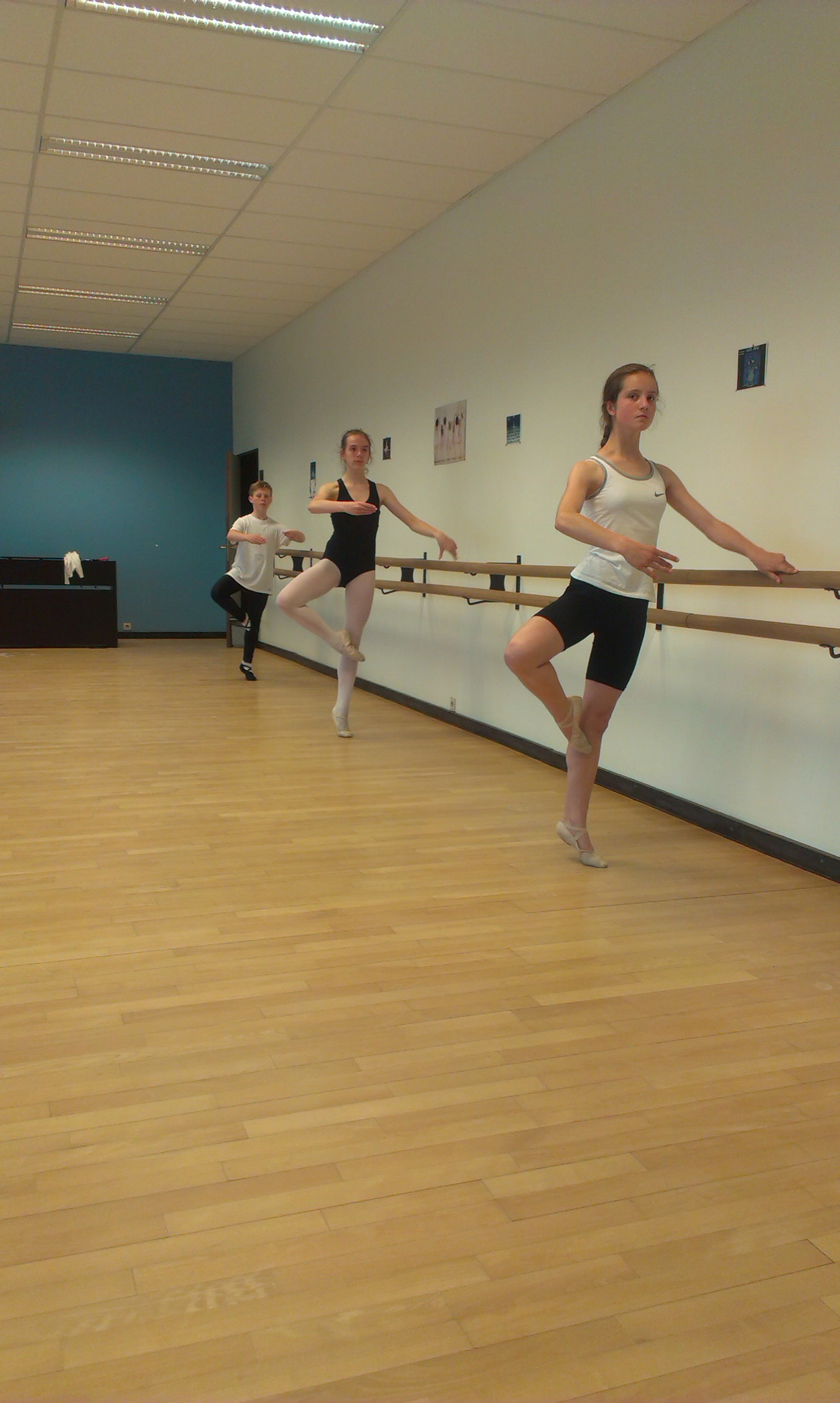 Duizenden meisjes en jongens volgen balletles in Vlaanderen en Nederland in hun vrije tijd